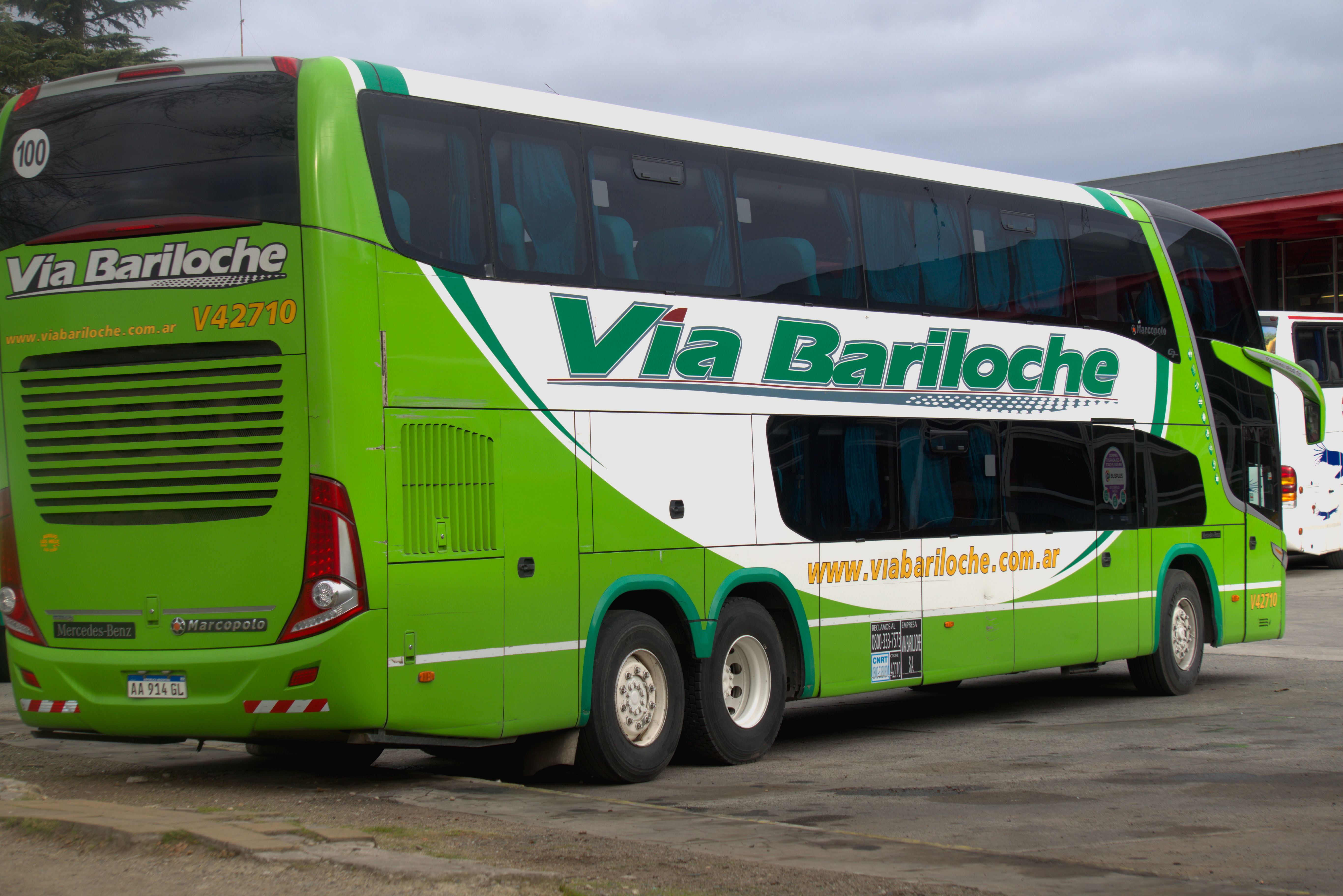 Bus de la empresa Via Bariloche, estacionado en Tandil, Argentina